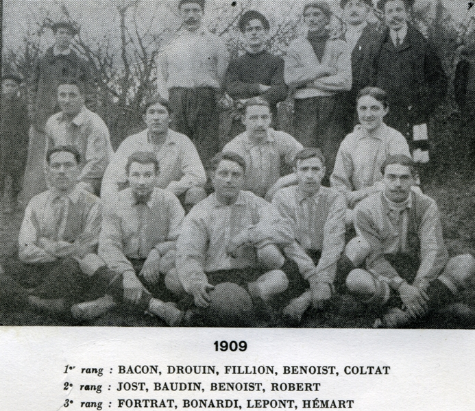 Sport Athlétique Sézannais 1909